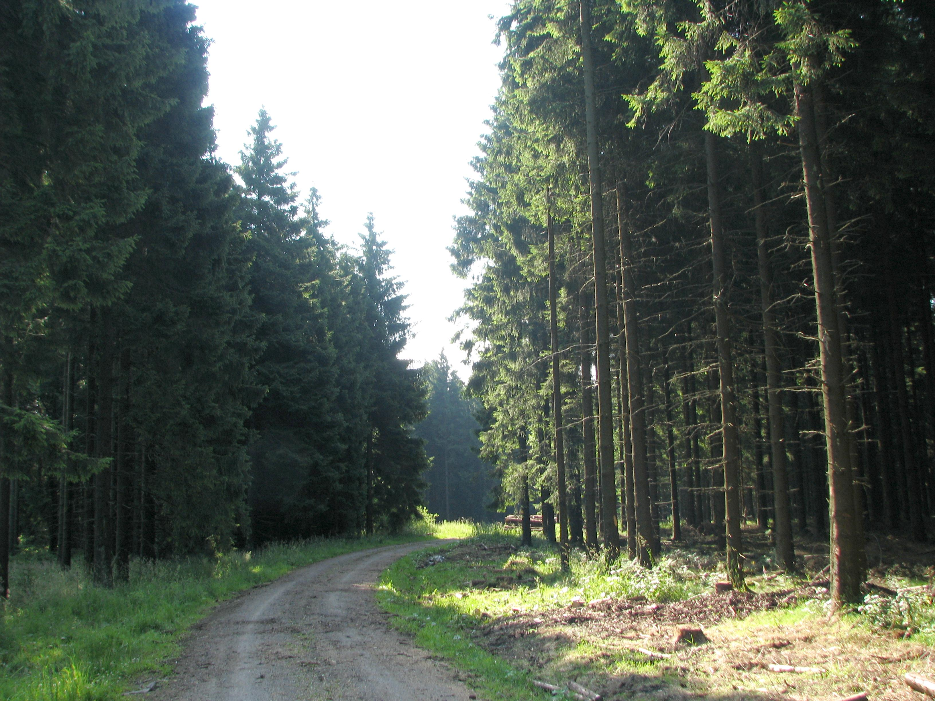 Typisches Waldbild des Hürtgenwaldes: Fichtenforst.